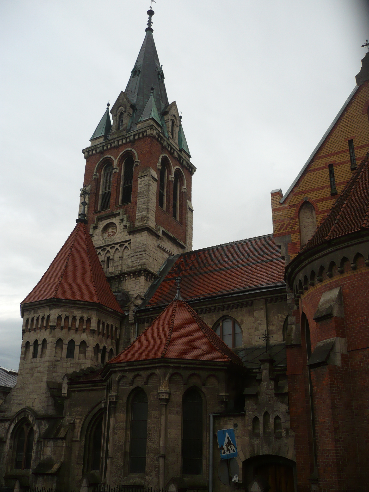 Czortków. Kościół pw. św. Stanisława